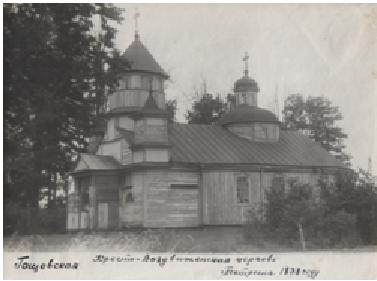 Беларуская (тарашкевіца): Гошчава (Hoščava). Царква